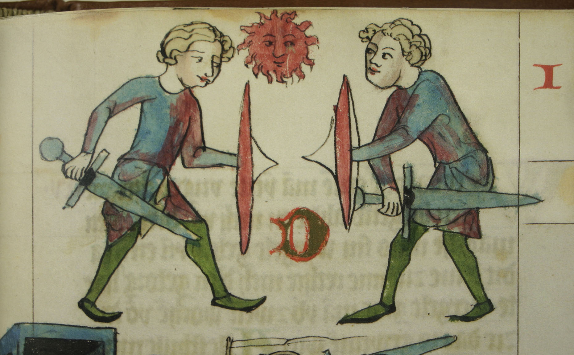 Gerichtlicher Zweikampf